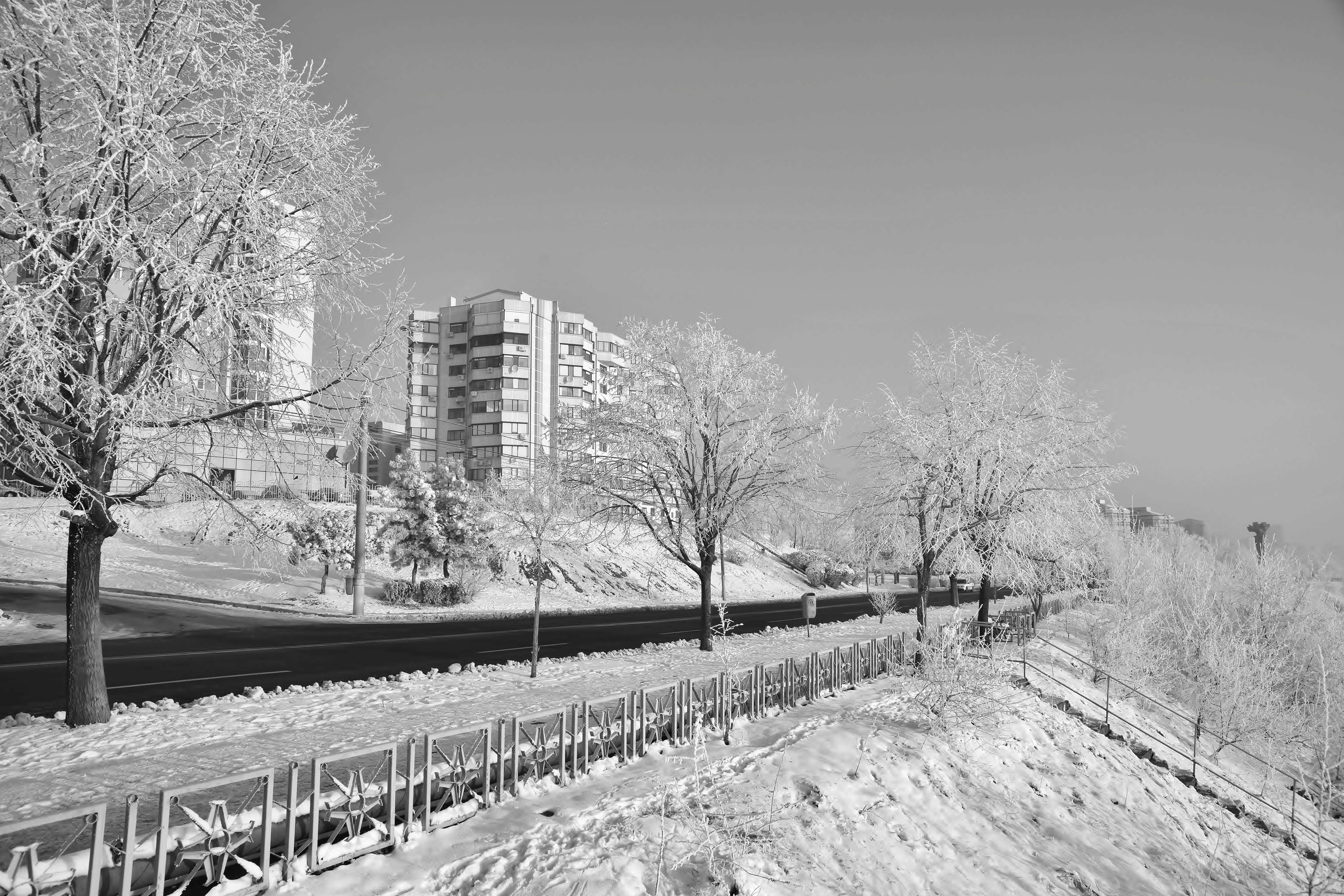 Faleza in white robe - Faleza in mantie alba